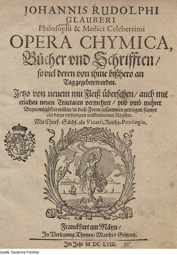 Original image description from the Deutsche Fotothek Chemie & Alchemie